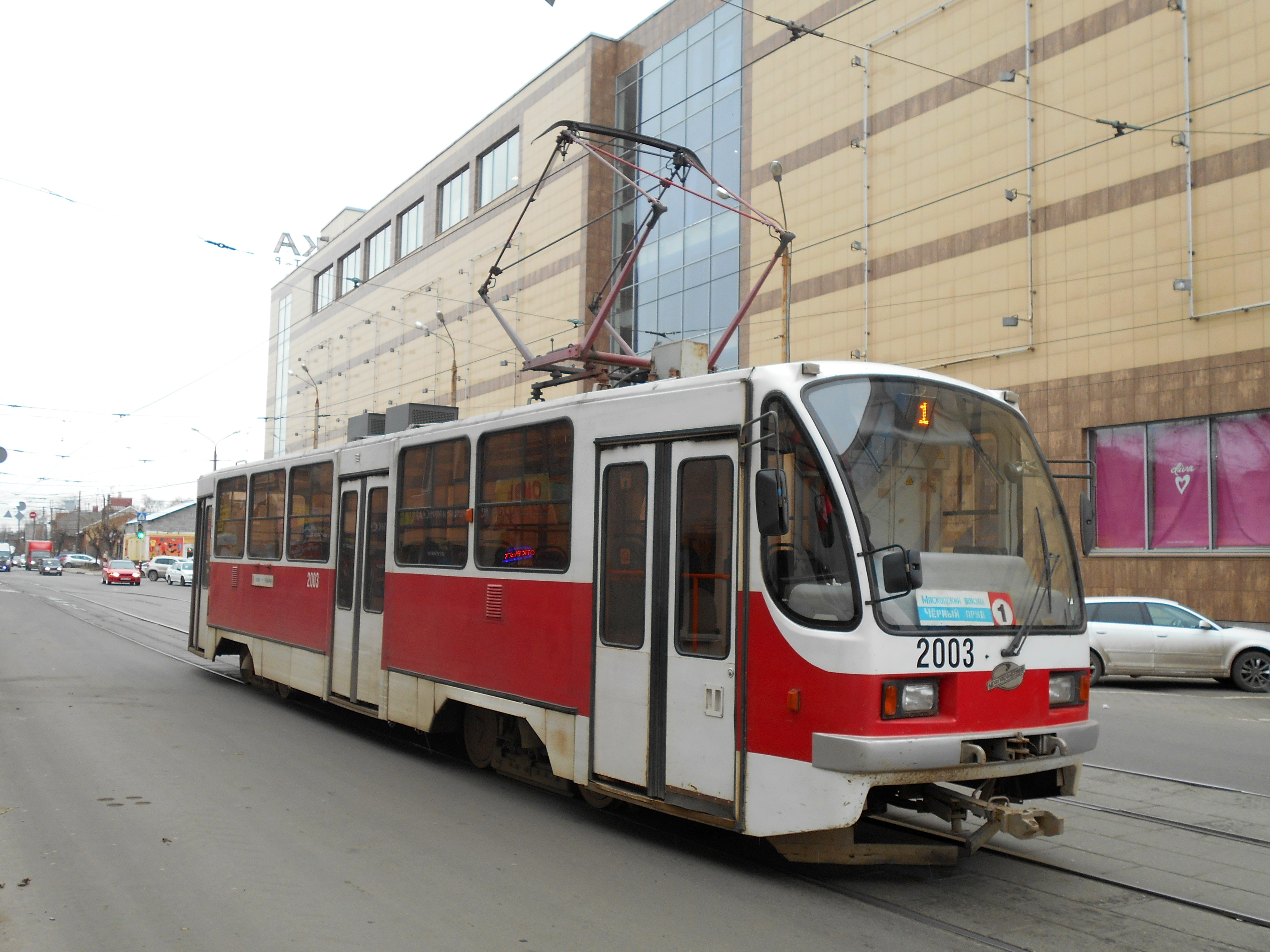 Трамвайный вагон 71-403 № 2003 в Нижнем Новгороде